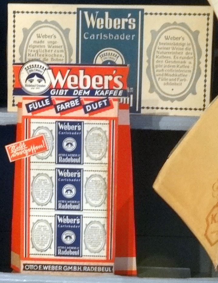 Weber's Carlsbader Kaffeegewürz der Kaffeesurrogatfabrik Otto E. Weber / Radebeul im Kreismuseum Finsterwalde